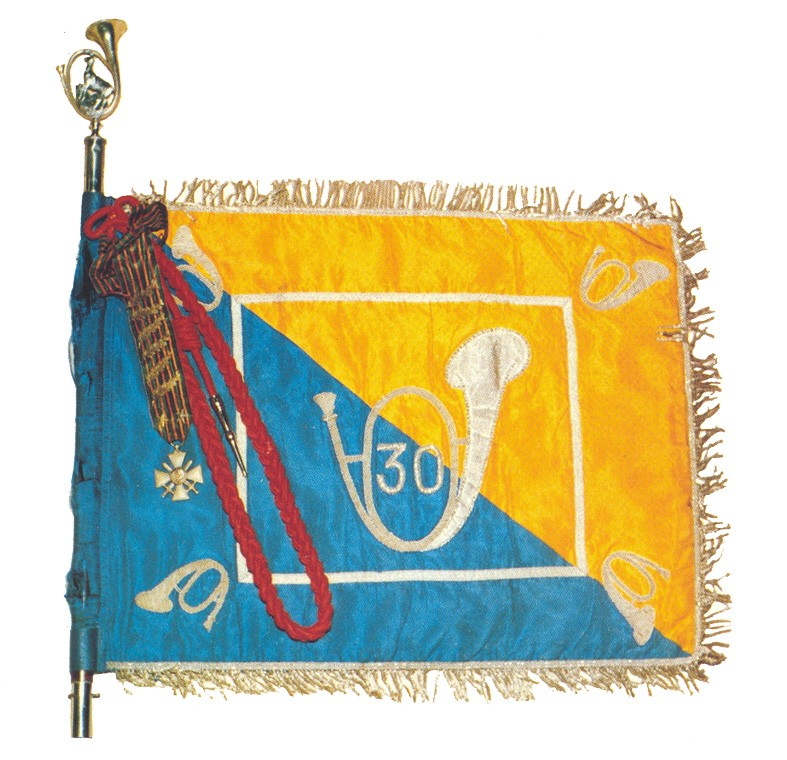 Fanion du 30° Groupe de Chasseur